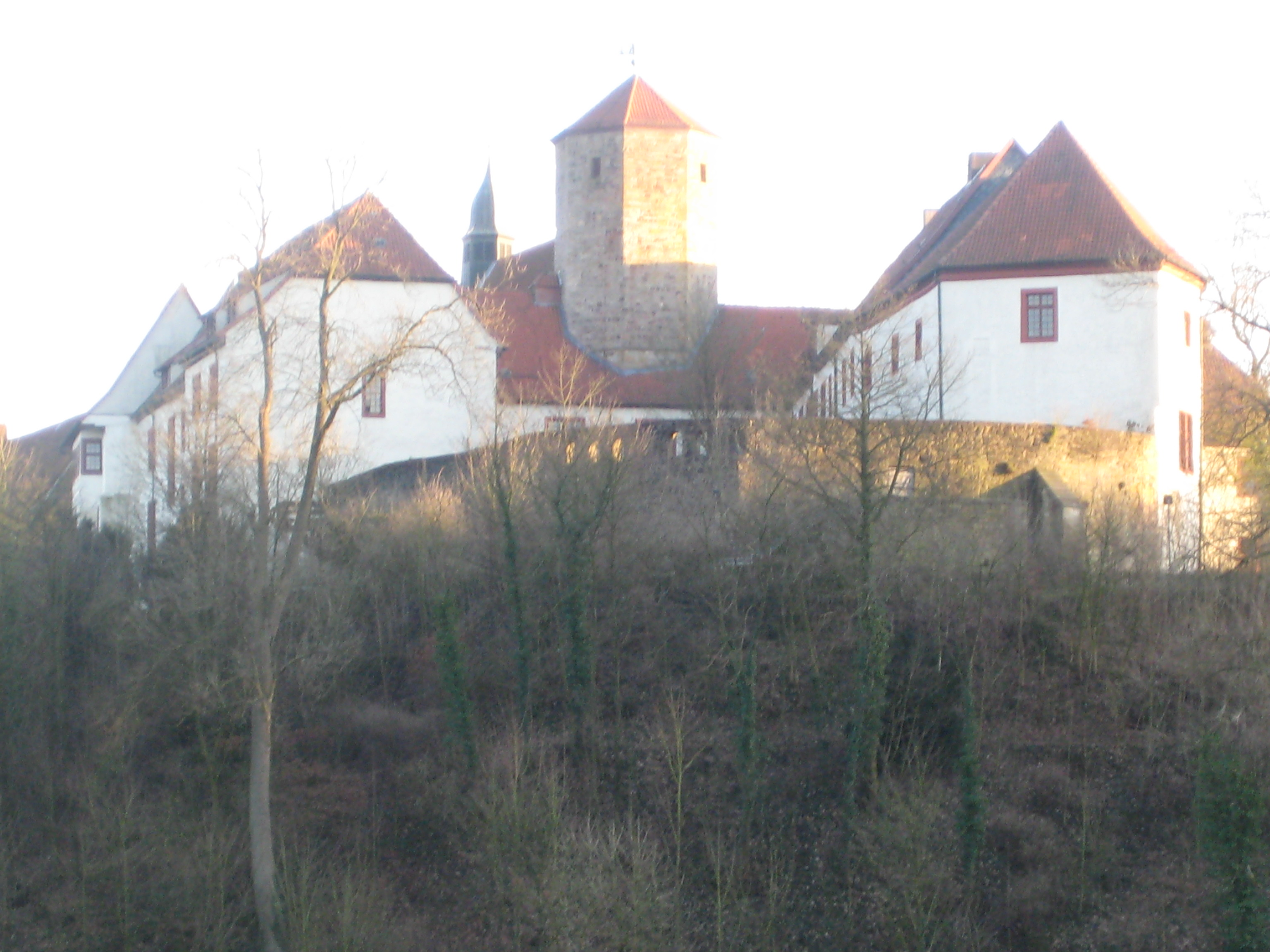 Schloss und Benediktinerabtei Iburg, Ansicht vom Charlottenburger Ring auf die Schlossflügel und den so genannten Bennoturm